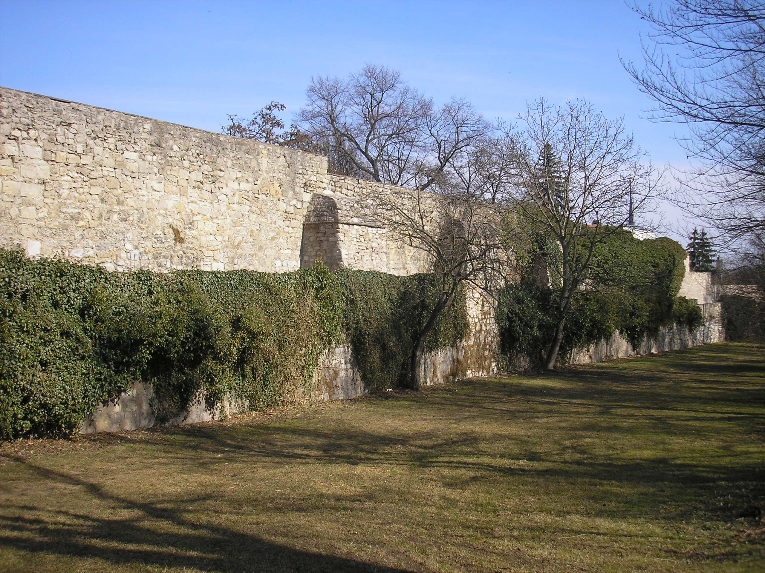 Die Stadtmauer östlich des Neutors in Arnstadt (Thüringen).